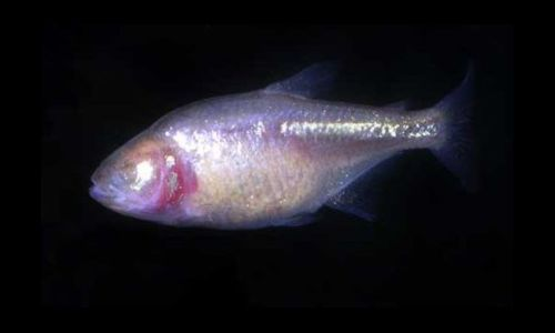 Blind tetra photo, Tiago do vale.